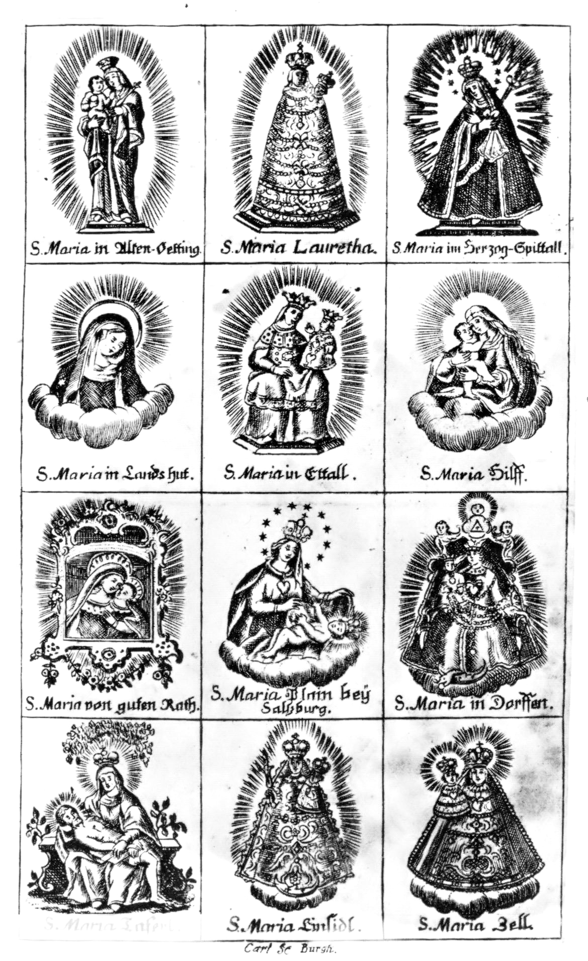 Zwölf Marianische Schluckbildchen